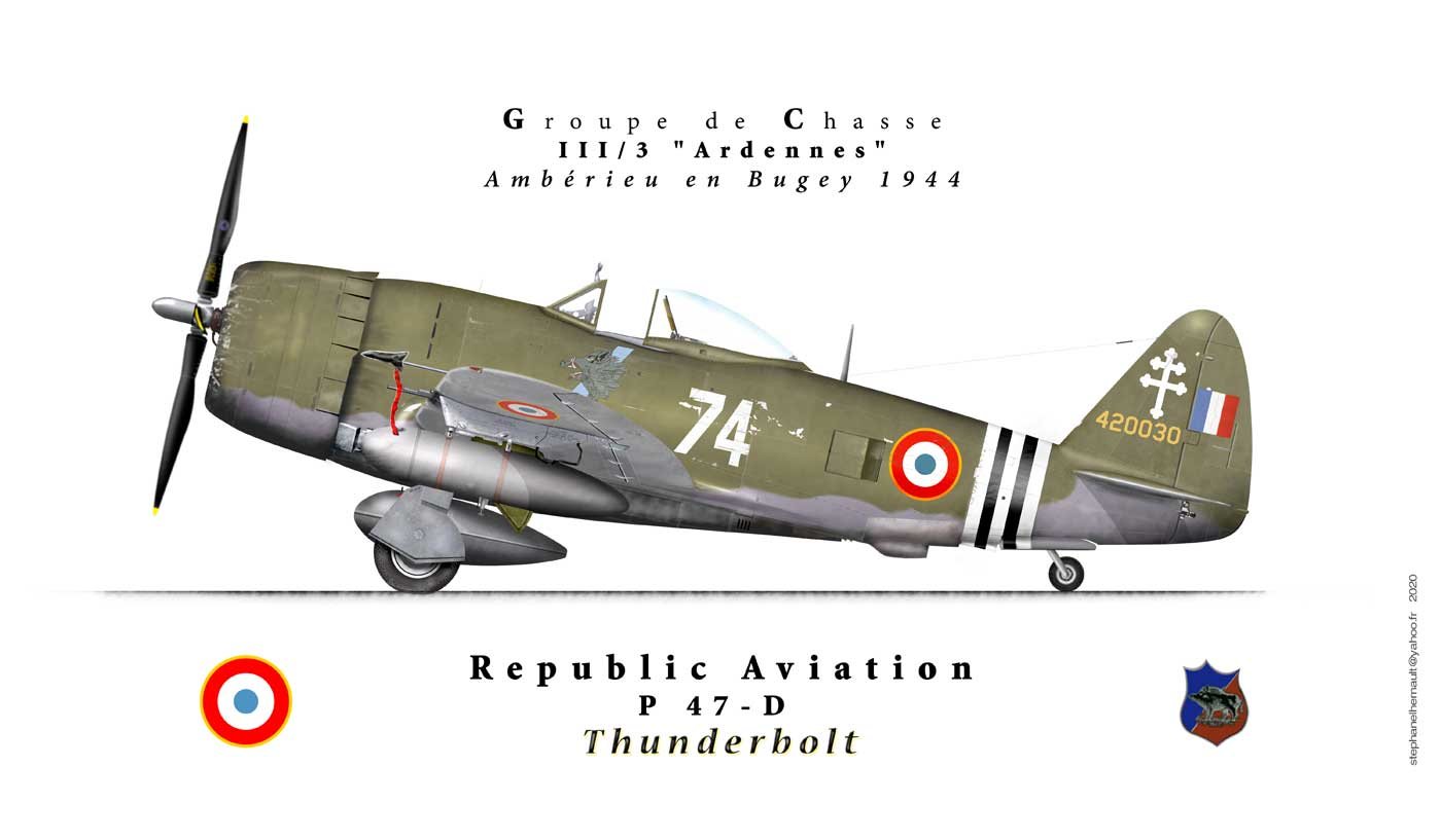 profil P47 D groupe de chasse II/5 Lafayette France 1944